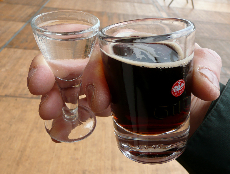 Lüttje Lage Handhaltung